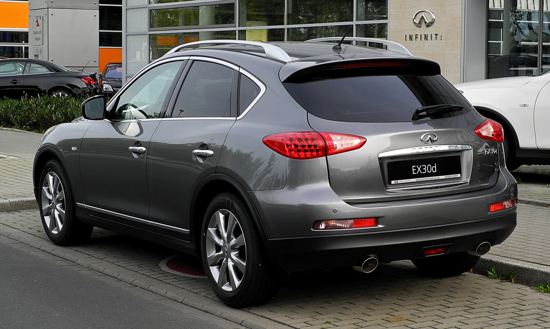 Infiniti FX30d GT Premium (J50)